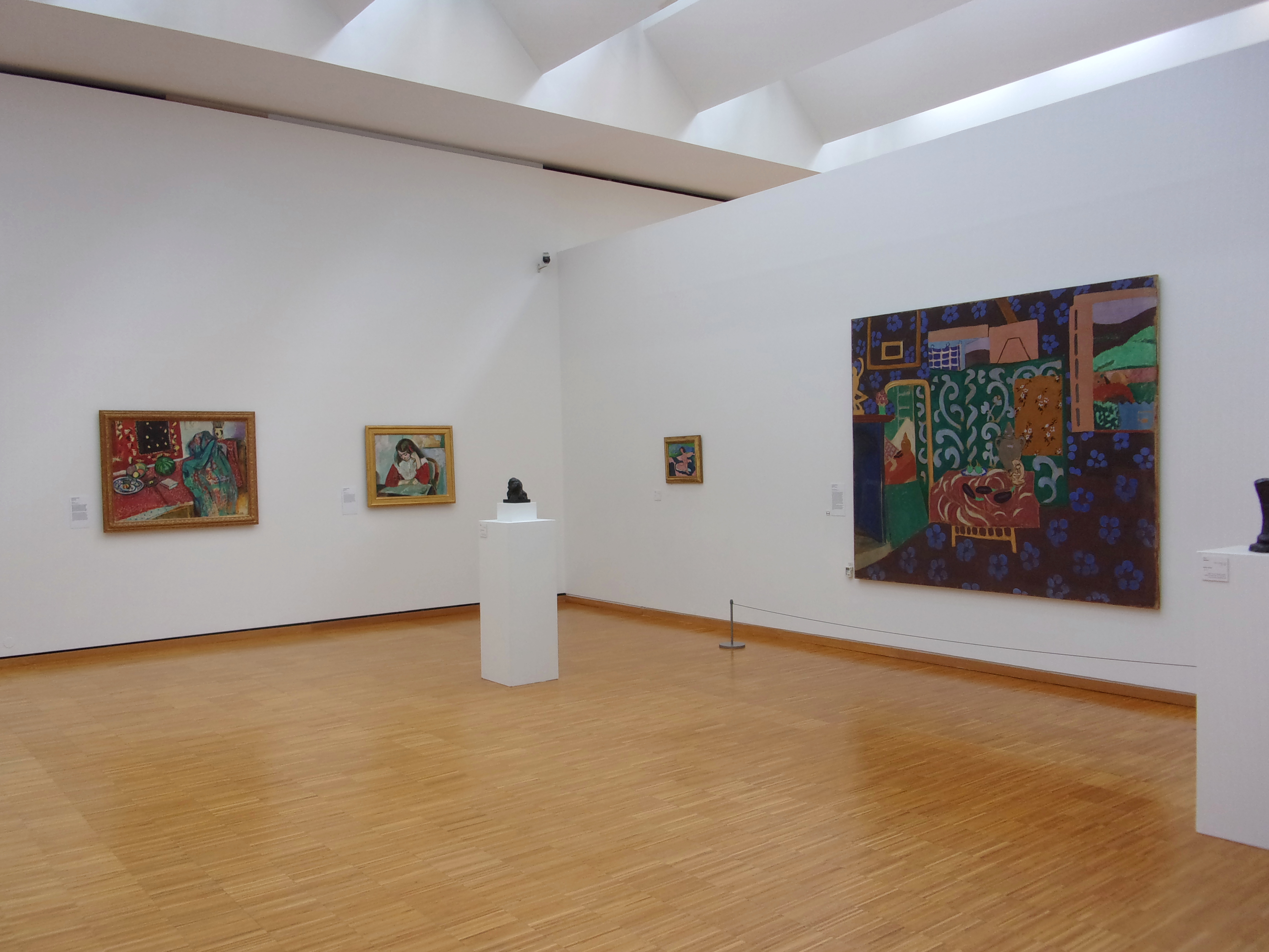 Salle 27 d'art moderne, musée de Grenoble.